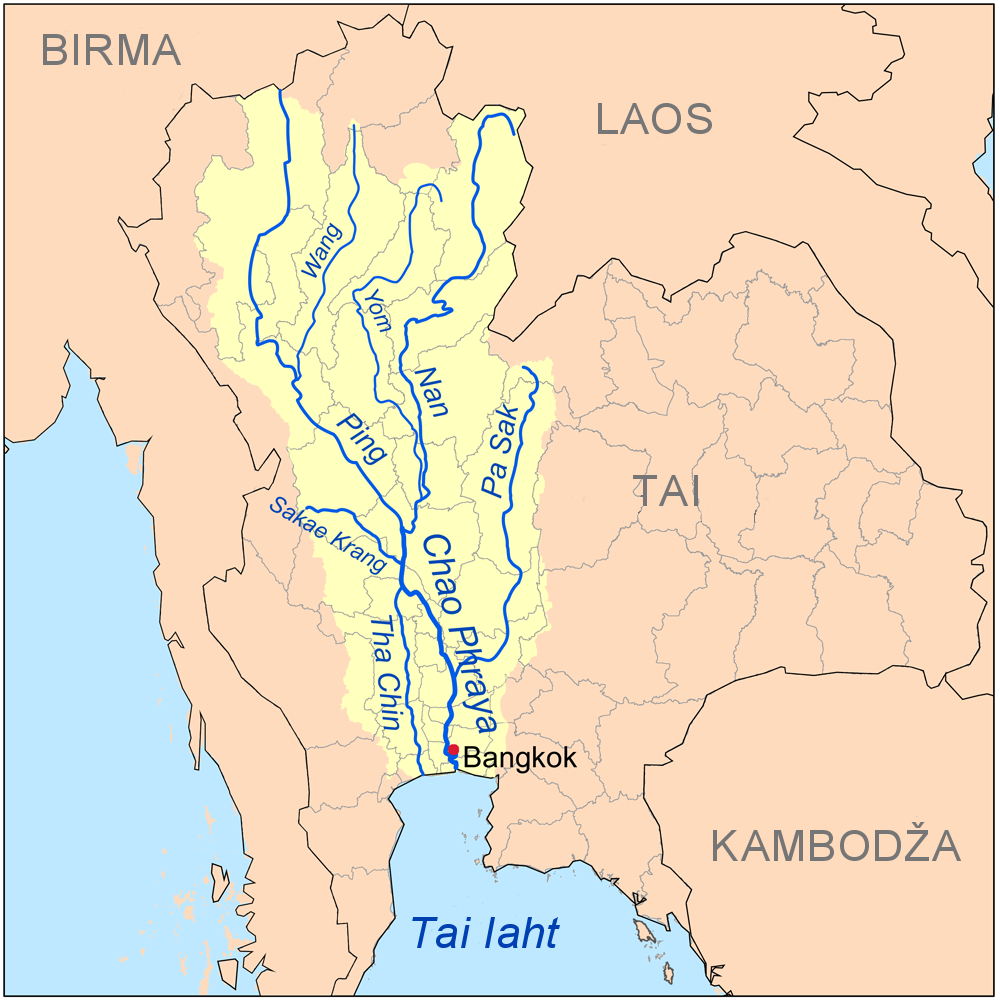 Chao Phraya